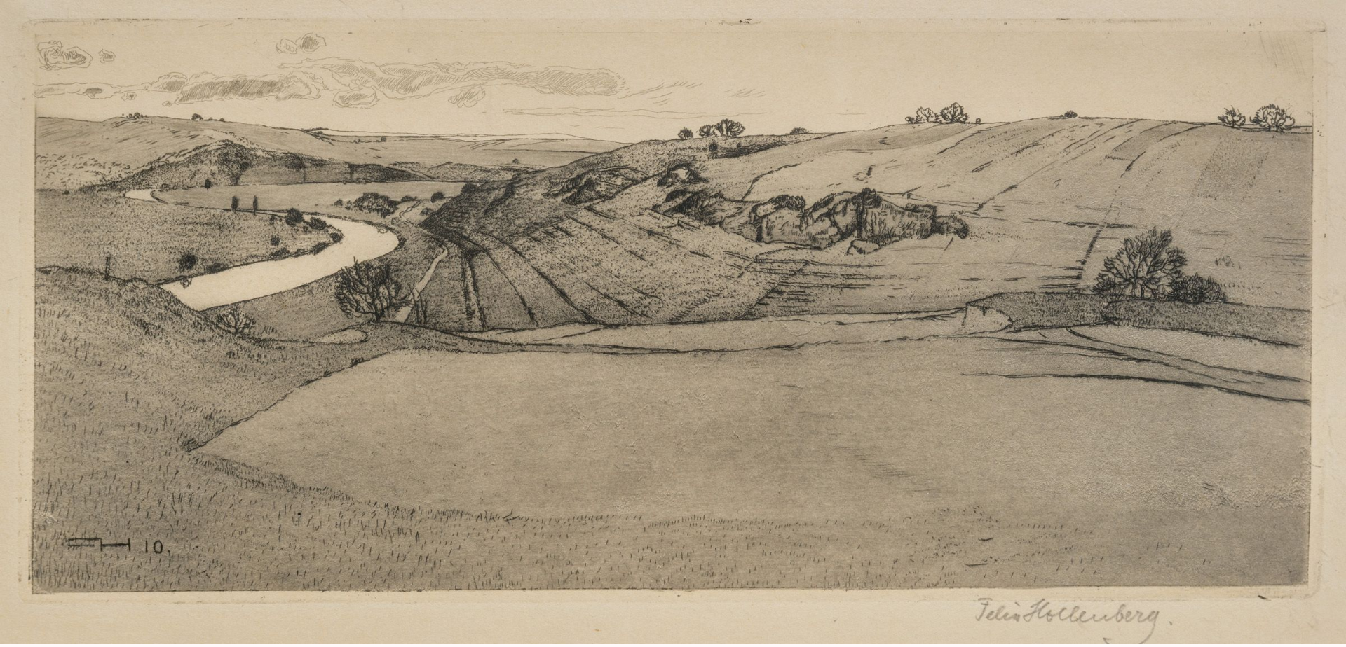 Vorfrühlingsabend über der schwäbischen Alb, 1910. Radierung auf Bütten. In Bleistift unten rechts signiert. Sammlung Manfred Erb.